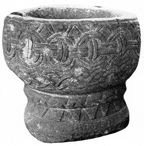 Mårdaklevs kyrka. Dopfunt